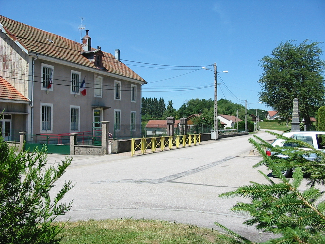 Arrentès-de-Corcieux, commune des Vosges : au Houssot, la mairie.